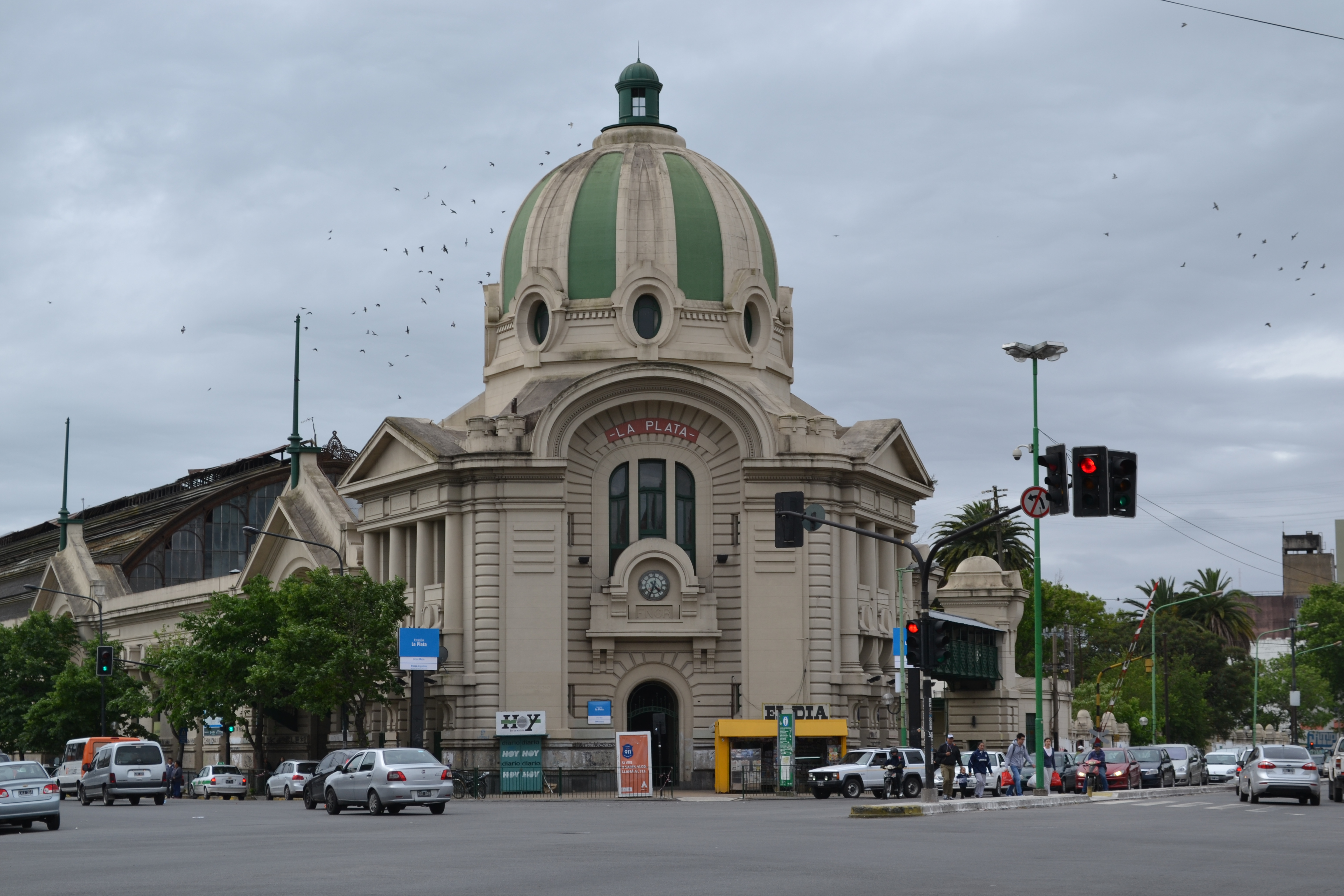 Estación de tren en Ciudad de La Plata